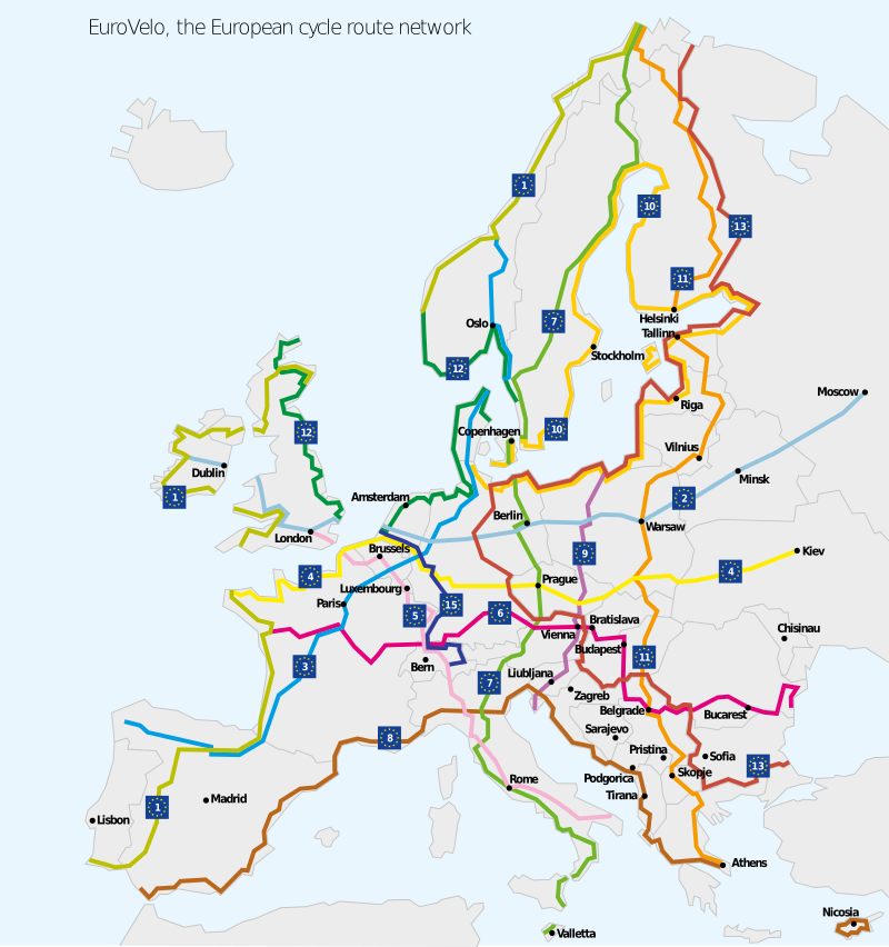 Rutas de las EuroVelo